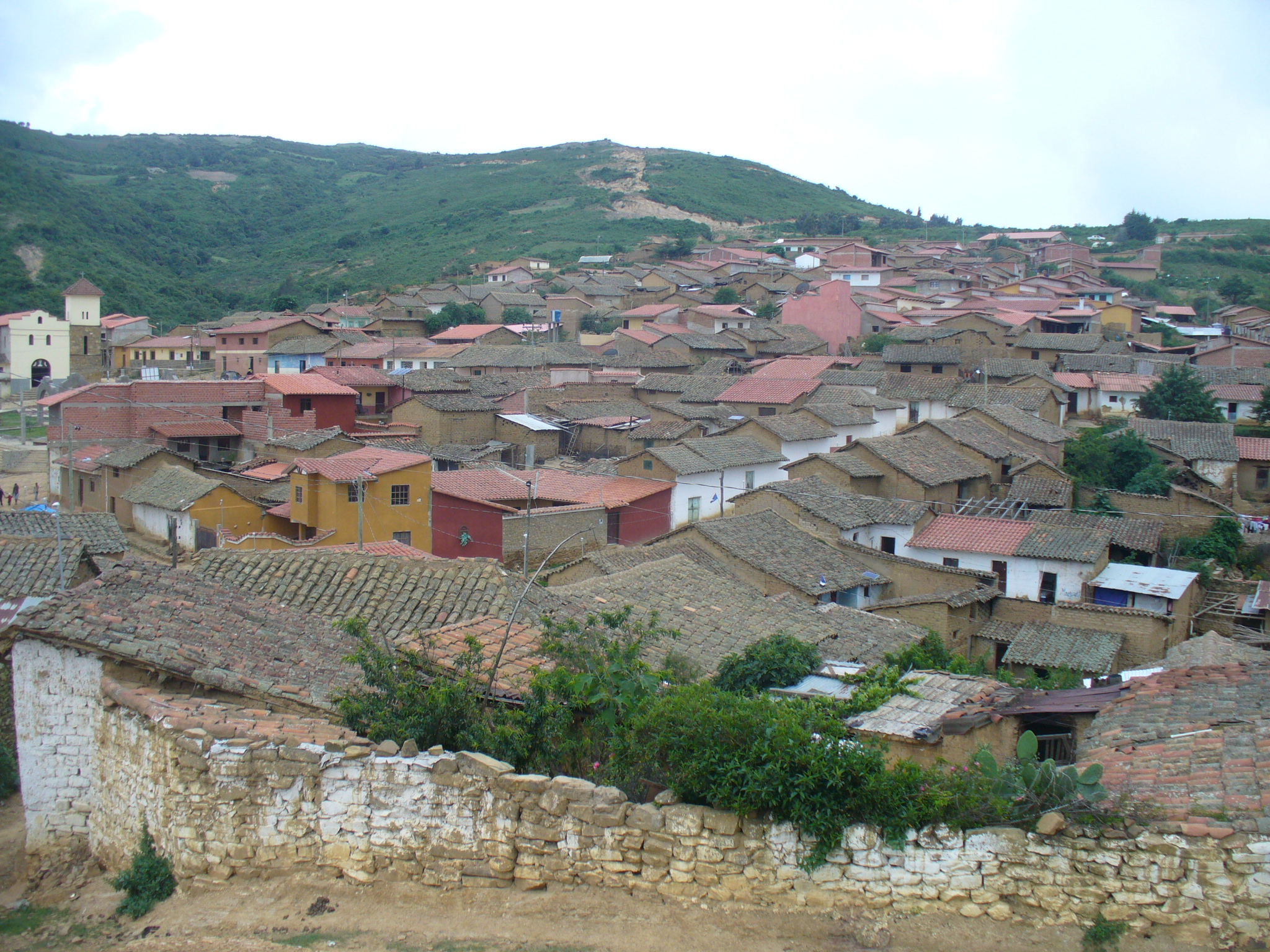 vista parcial de la población de Pucará